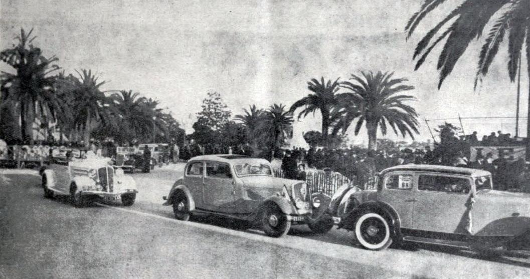 Défilé d'élégance à Cannes, des voitures du rallye Paris-Saint-Raphael féminin 1935.